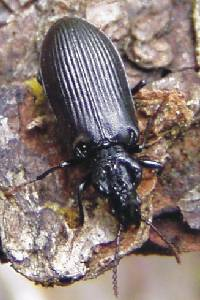 Pythos kolwensis - a rare beetle thriving in primeval forests